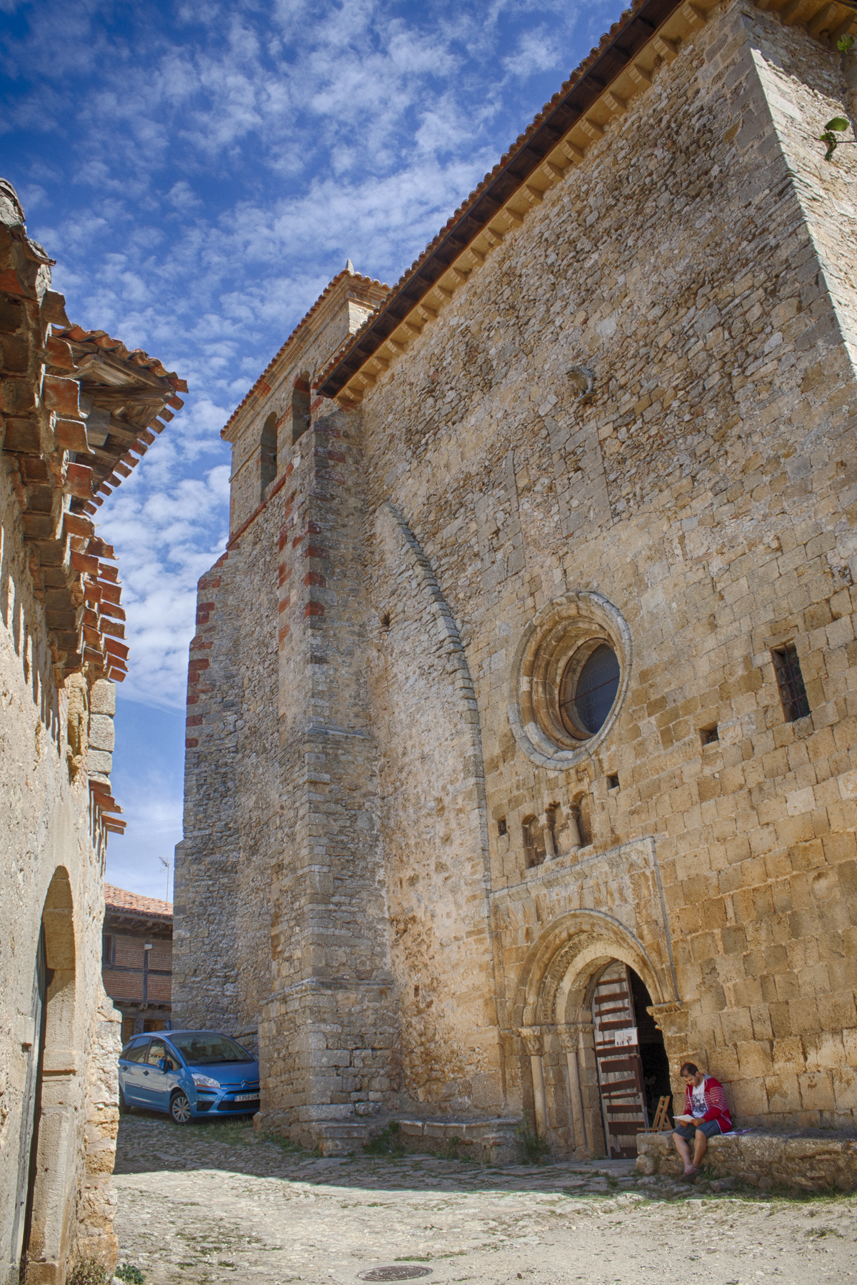 Iglesia de Nuestra Señora del Castill Provincia de Soria Castilla y León España